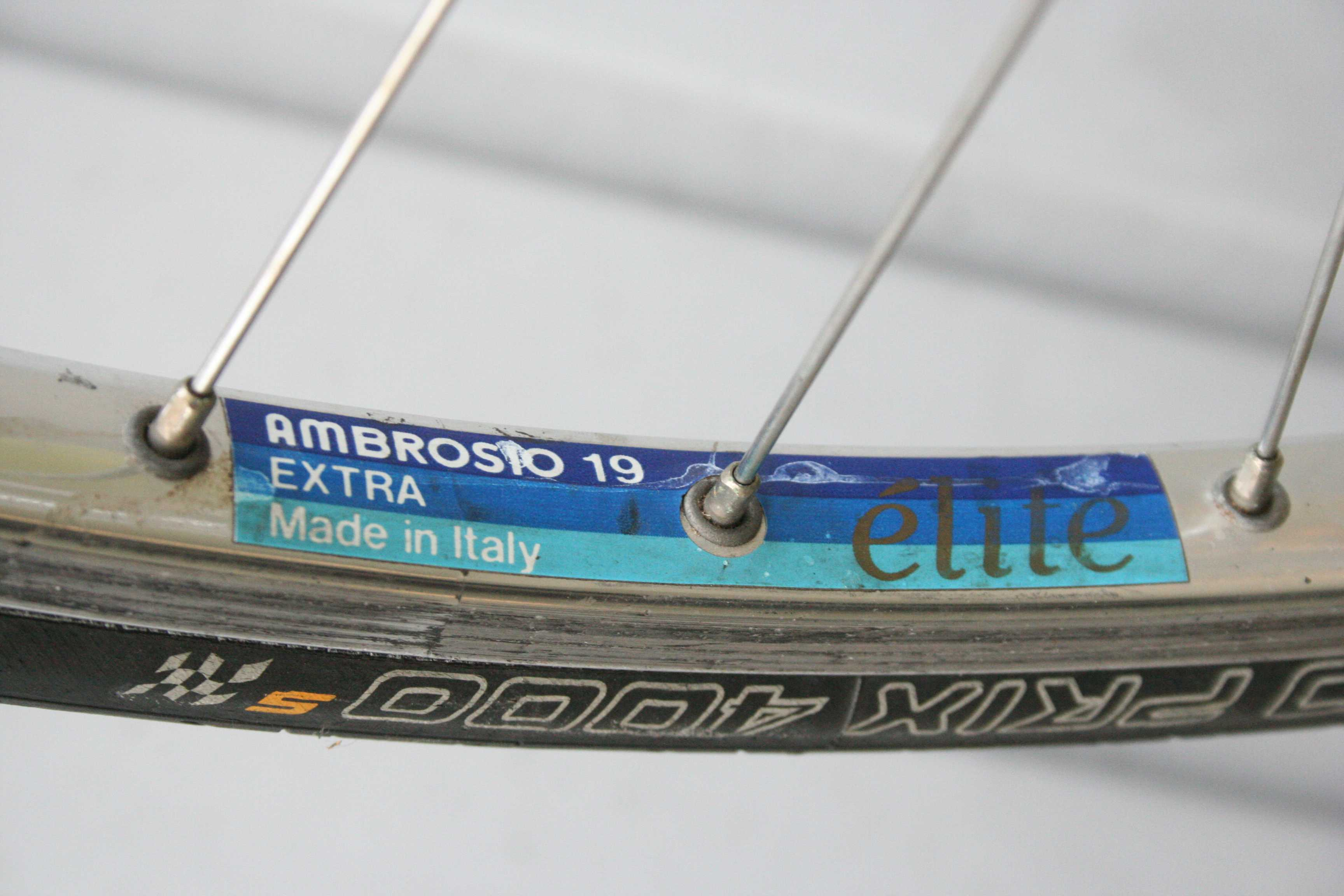 Ambrosio Felge Elite 18